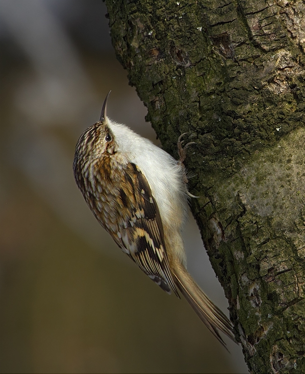 Certhia familiaris, Konicko, Litovelské pomoraví, Czech Republic